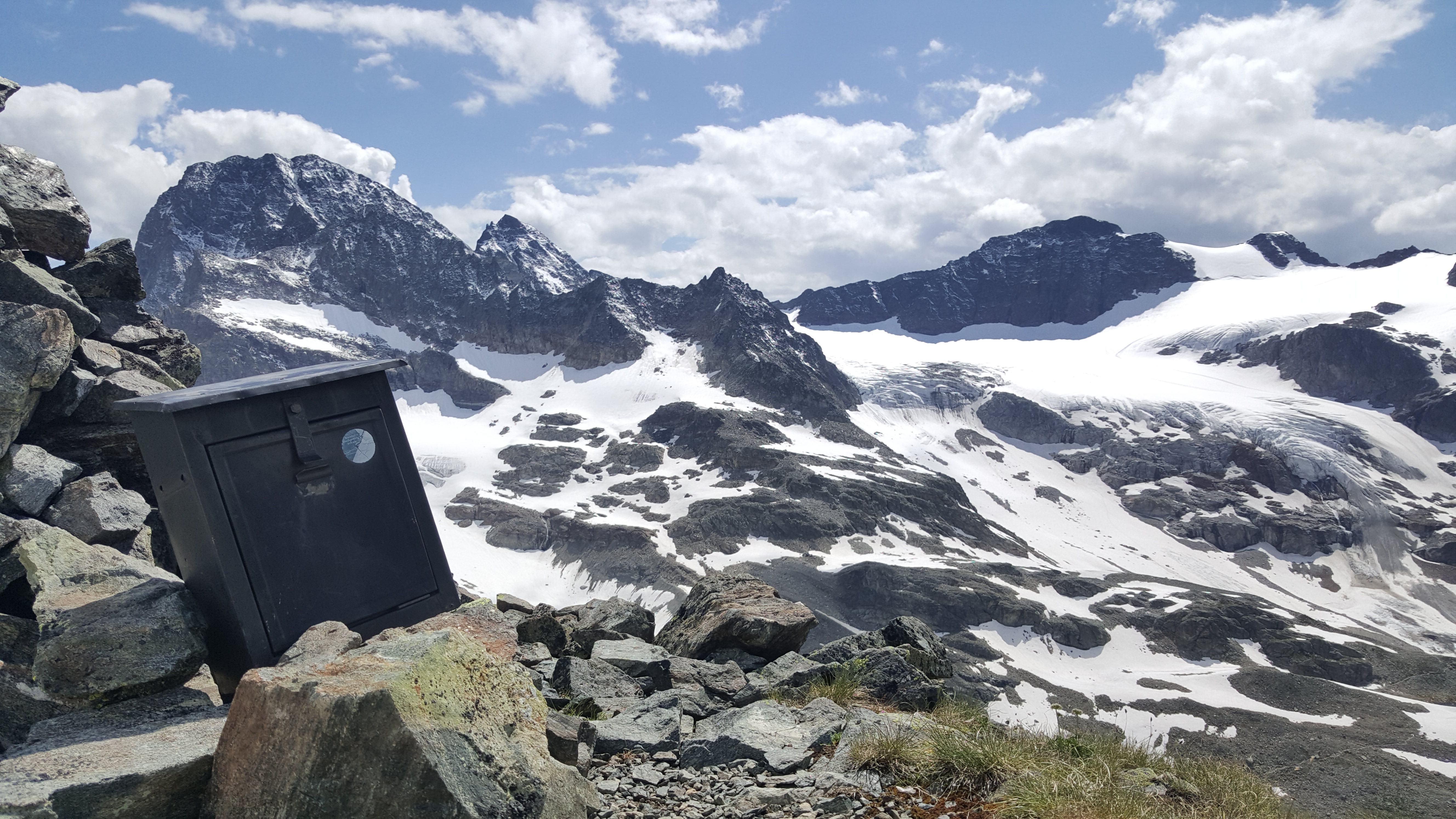 Blick zum Piz Buin vom Gipfel des Vermuntkopf.